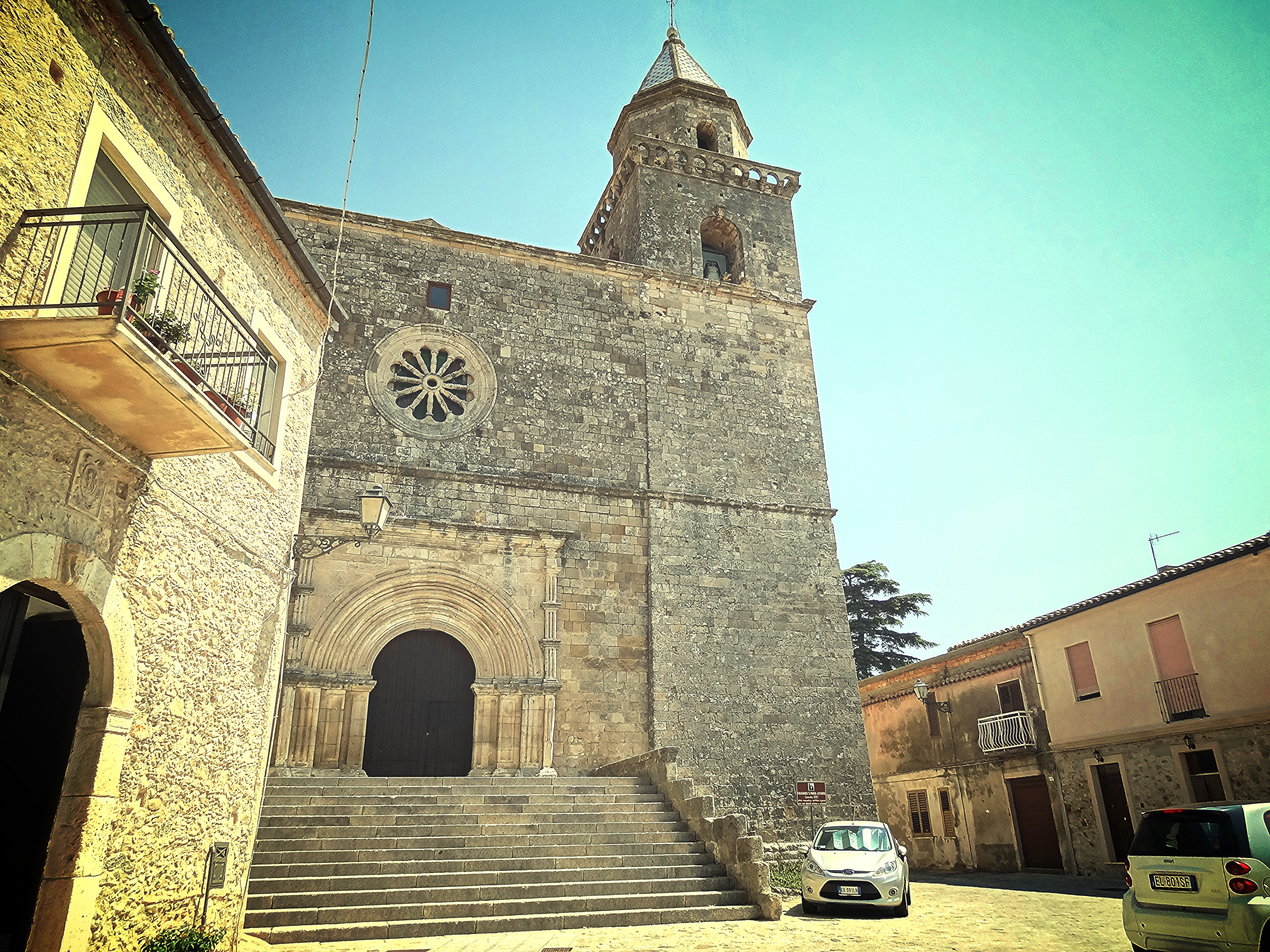 Cropani (KR) - Calabria